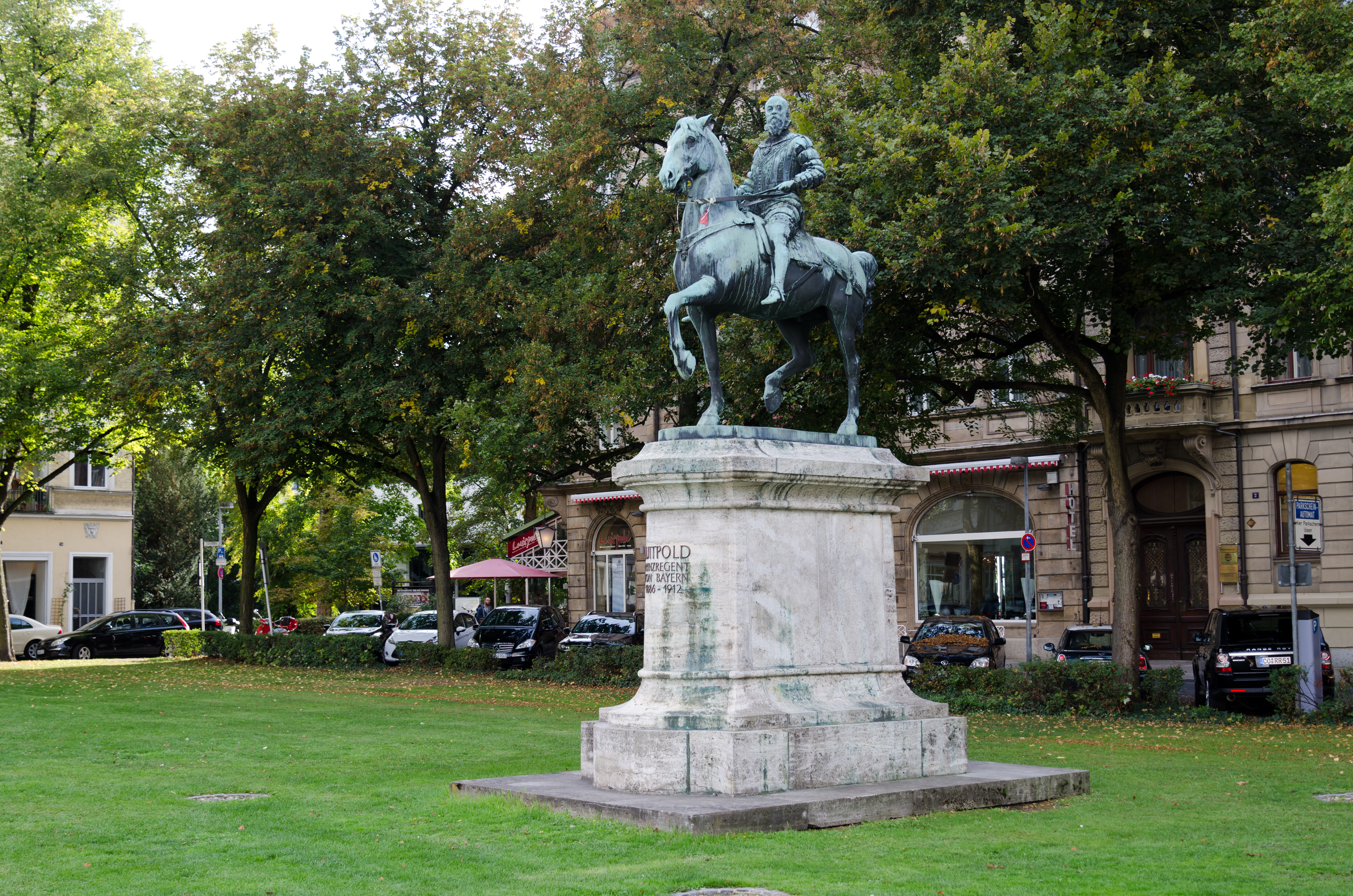 Bamberg, Schönleinsplatz, Denkmal Prizregent Luitpold